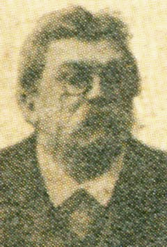 Eginhard von Barfus, Schriftsteller (Abenteuerromane) und Offizier (1842—1851 preußischer Dienst, 1851—1858 in der niederländischen Kolonialarmee), * 1825 Tetzleben, Pommern, † 1909 München)